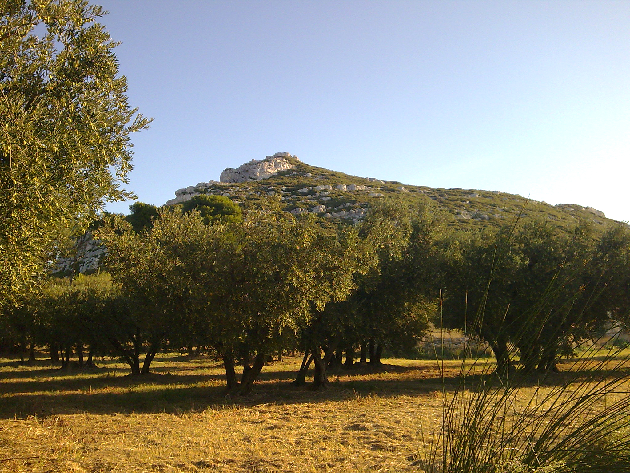 Castellas de Maussane-les-Alpilles, habité à l'Âge du Fer